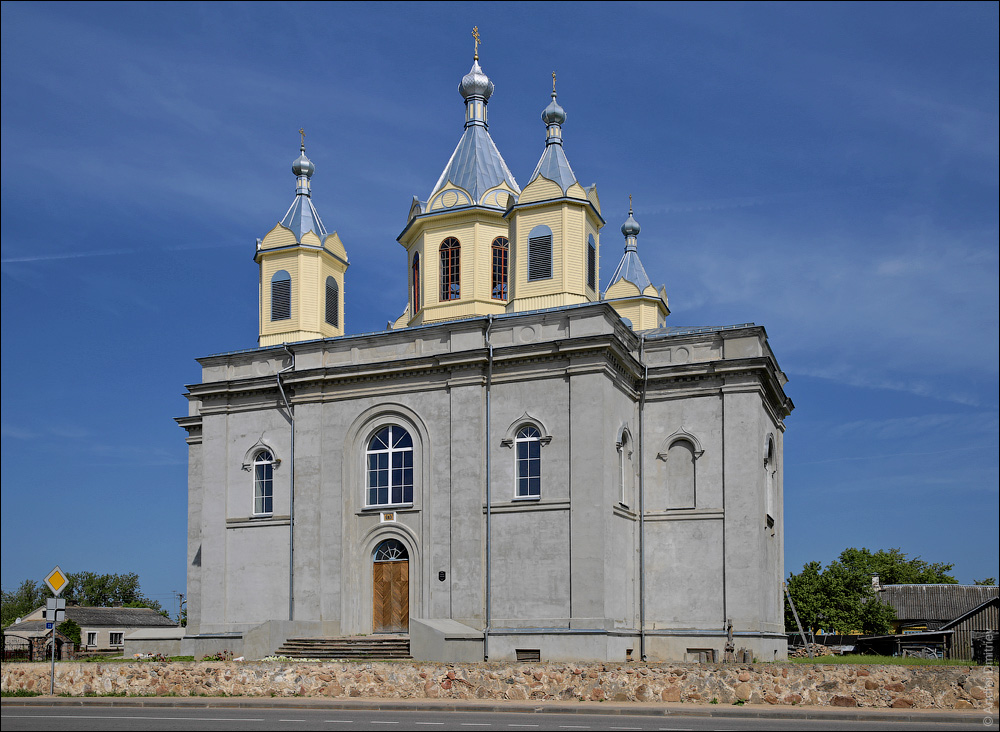 Дзярэчын. Царква